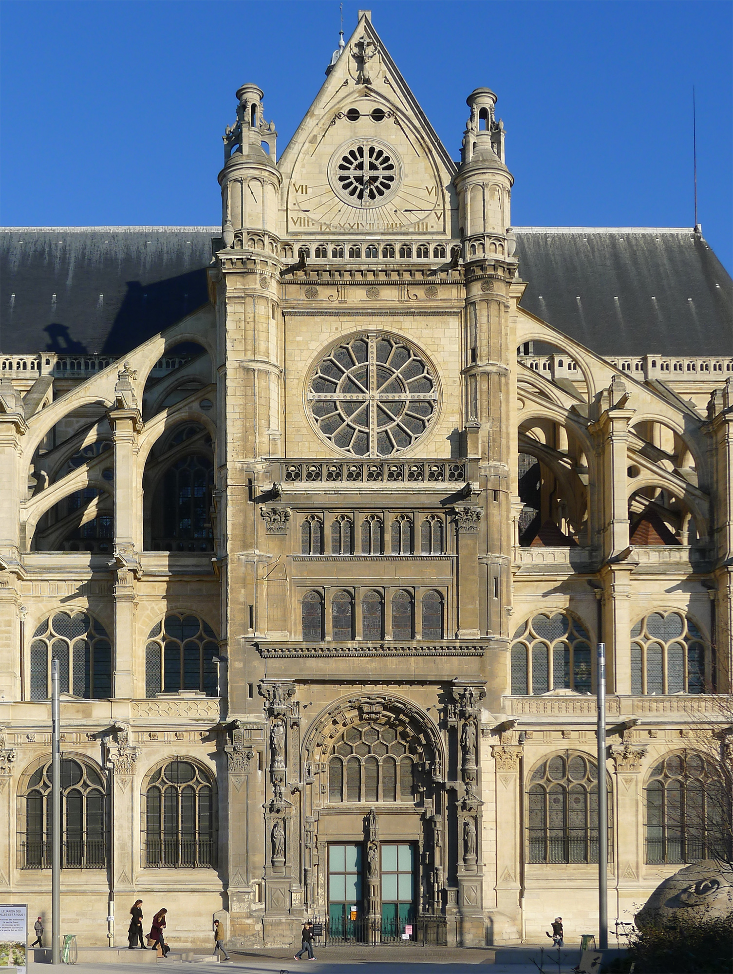 Église Saint-Eustache de Paris (transept sud) - Paris Ier